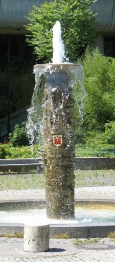 Wittelsbacher Park Reichenberger Brunnen